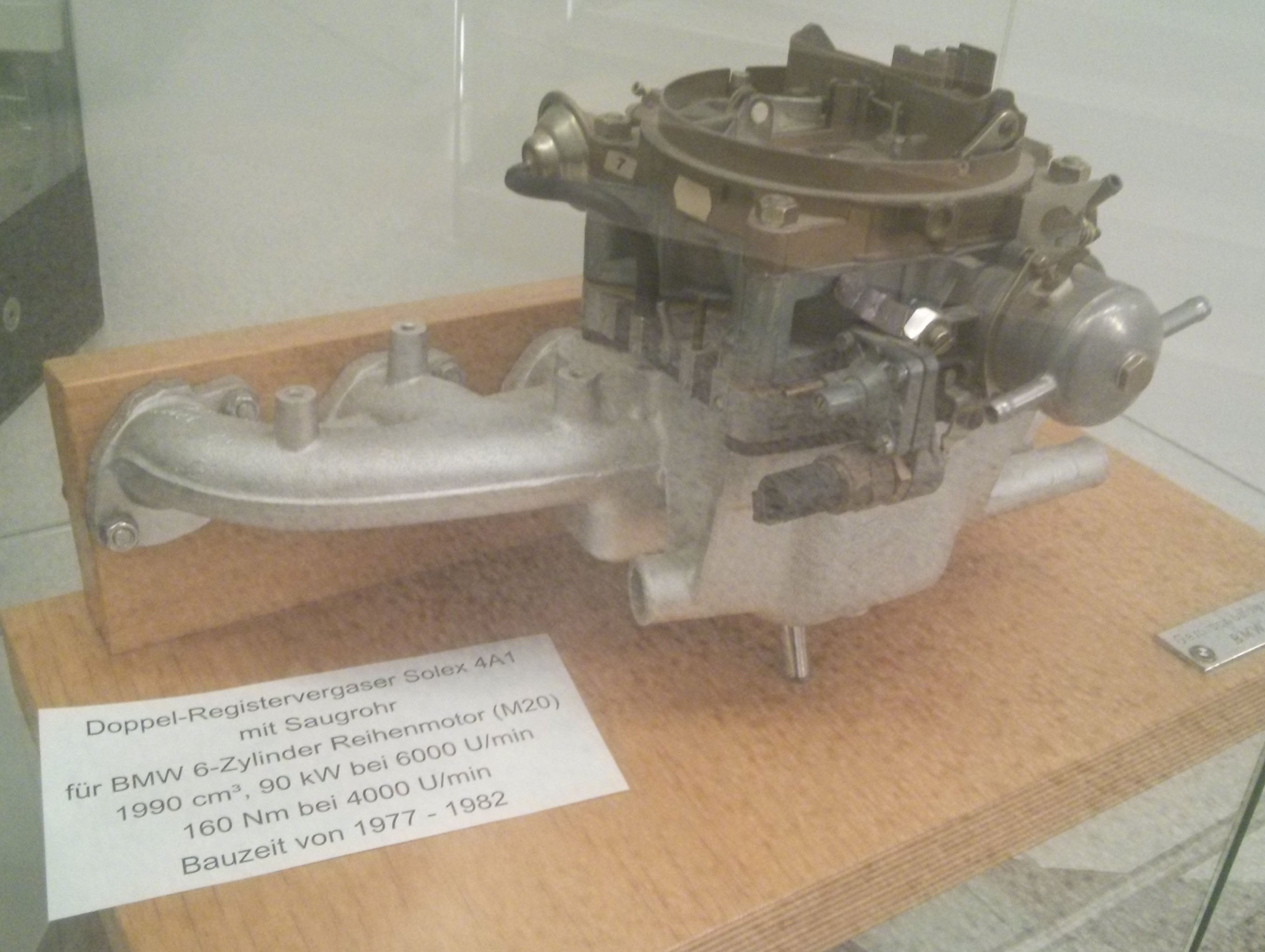 Saugrohr eines BMW M20B20 mit Solex-Doppelregistervergaser 4A1 Diese Konstruktion wurde für den M20-Motor verwendet, der im BMW E12 und E21 eingebaut wurde.